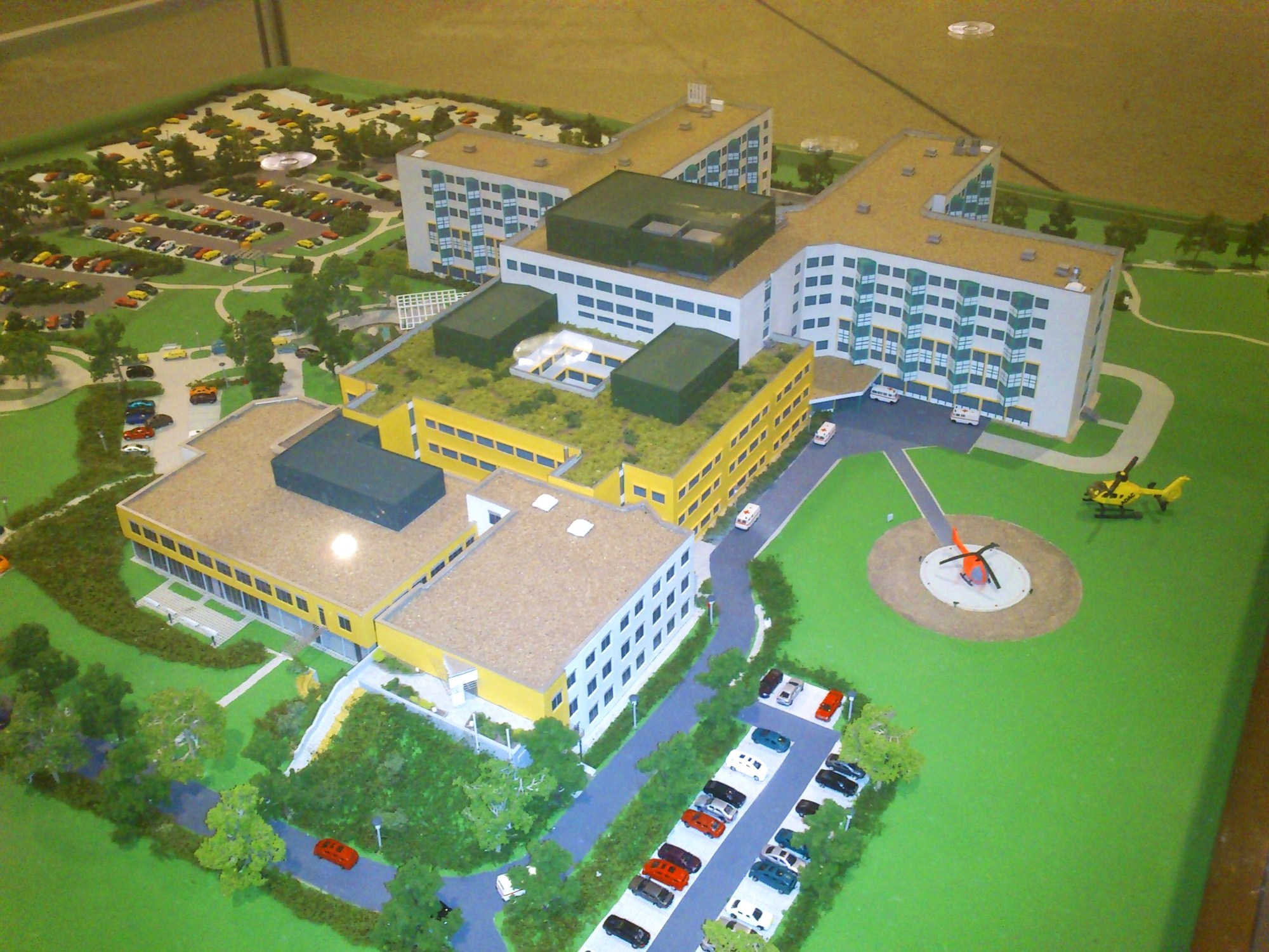 Modell vom Klinikum Meiningen mit Medizinischem Versorgungszentrum und Tagesklinik - Stand 2010